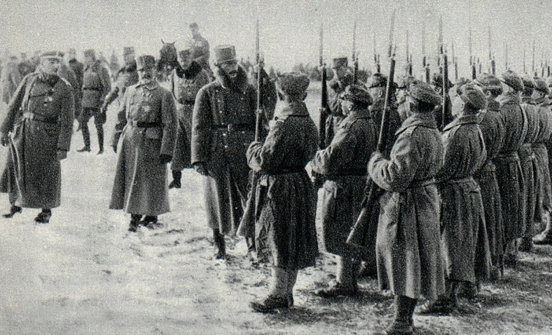 Przegląd Polskiego Korpusu Posiłkowego przez cesarza Karola I w Starej Żuczce.